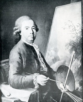 František Xaver Procházka (1746-1815)